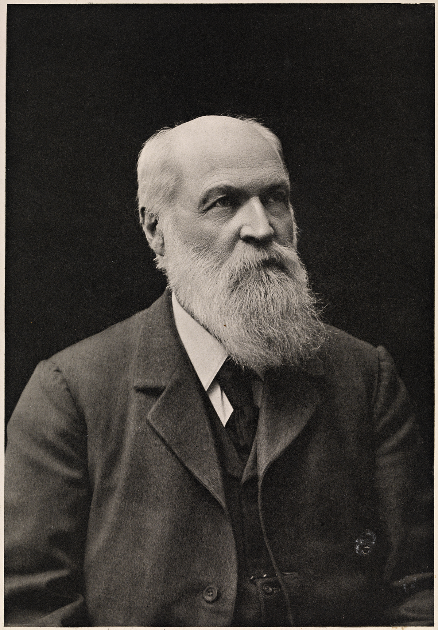 Tittel / Title: Portrett av Colin Archer (1832-1921) Beskrivelse / Description: Lystrykk. Colin Archer var Norges fremste båtkonstruktør på slutten av 1800-tallet. Han utviklet en ny konstruksjonsmetode for fartøyer som skulle tåle dårlig vær og vanskelige seilingsforhold. I dag huskes han best for redningsskøytene han konstruerte 1893–1909, og for polarskipet "Fram" (snl.no). Dato / Date: ukjent / unknown Fotograf / Photographer: ukjent / unknown Eier / Owner Institution: Nasjonalbiblioteket / National Library of Norway Lenke / Link: Bildesignatur / Image Number: blds_04493